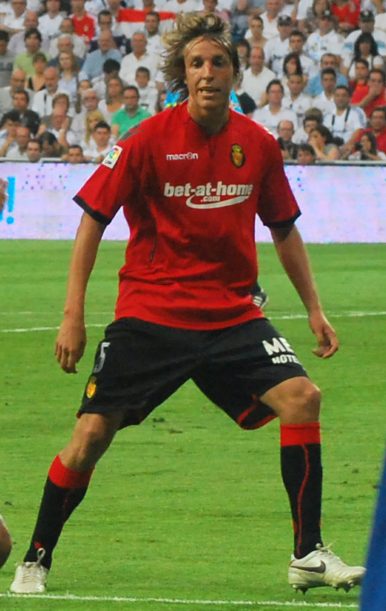 Tomás Pina Isla playing for RCD Mallorca.